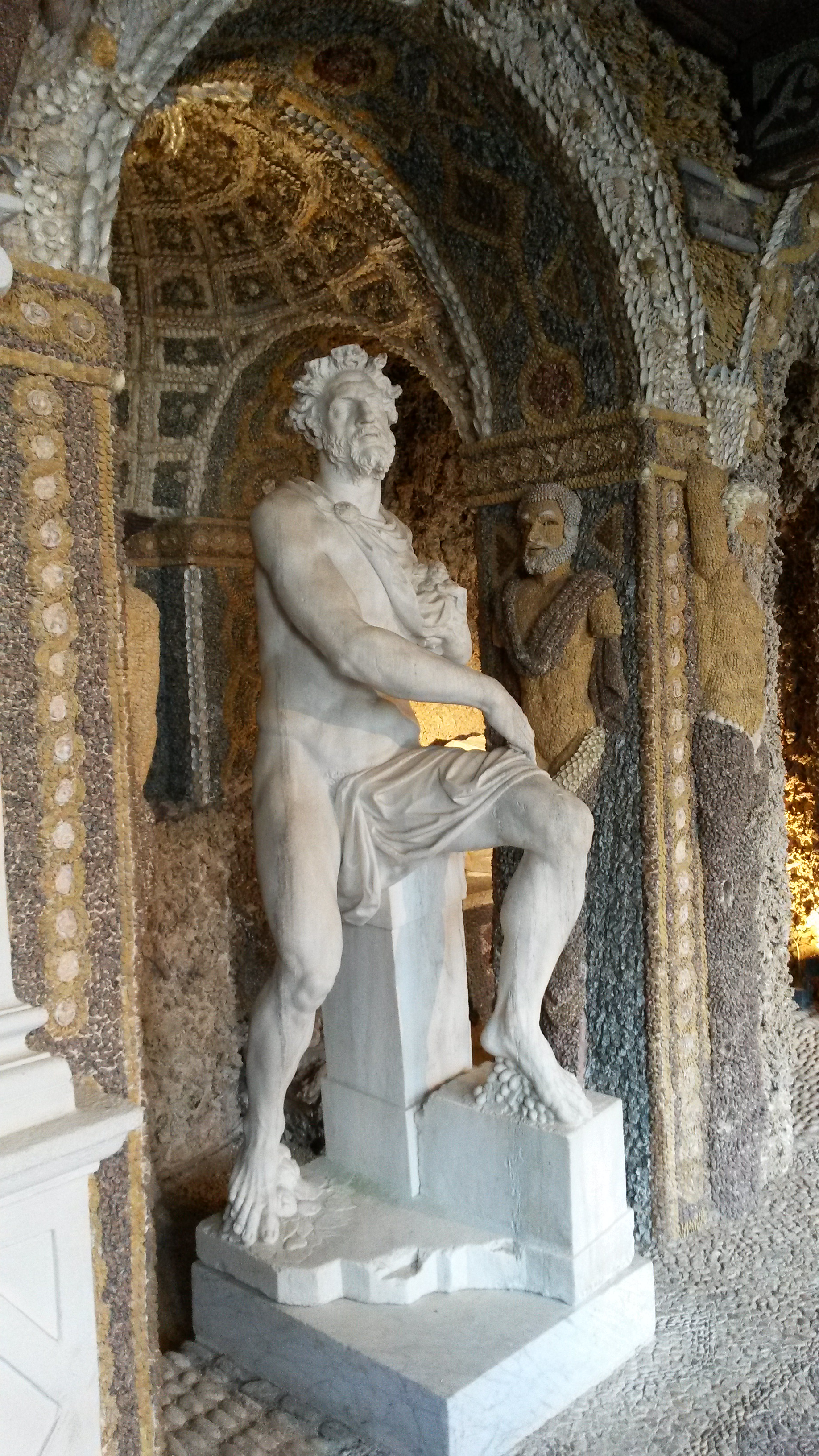 Grotte des fraîcheurs, avec une statue en marbre de Vertumnus.